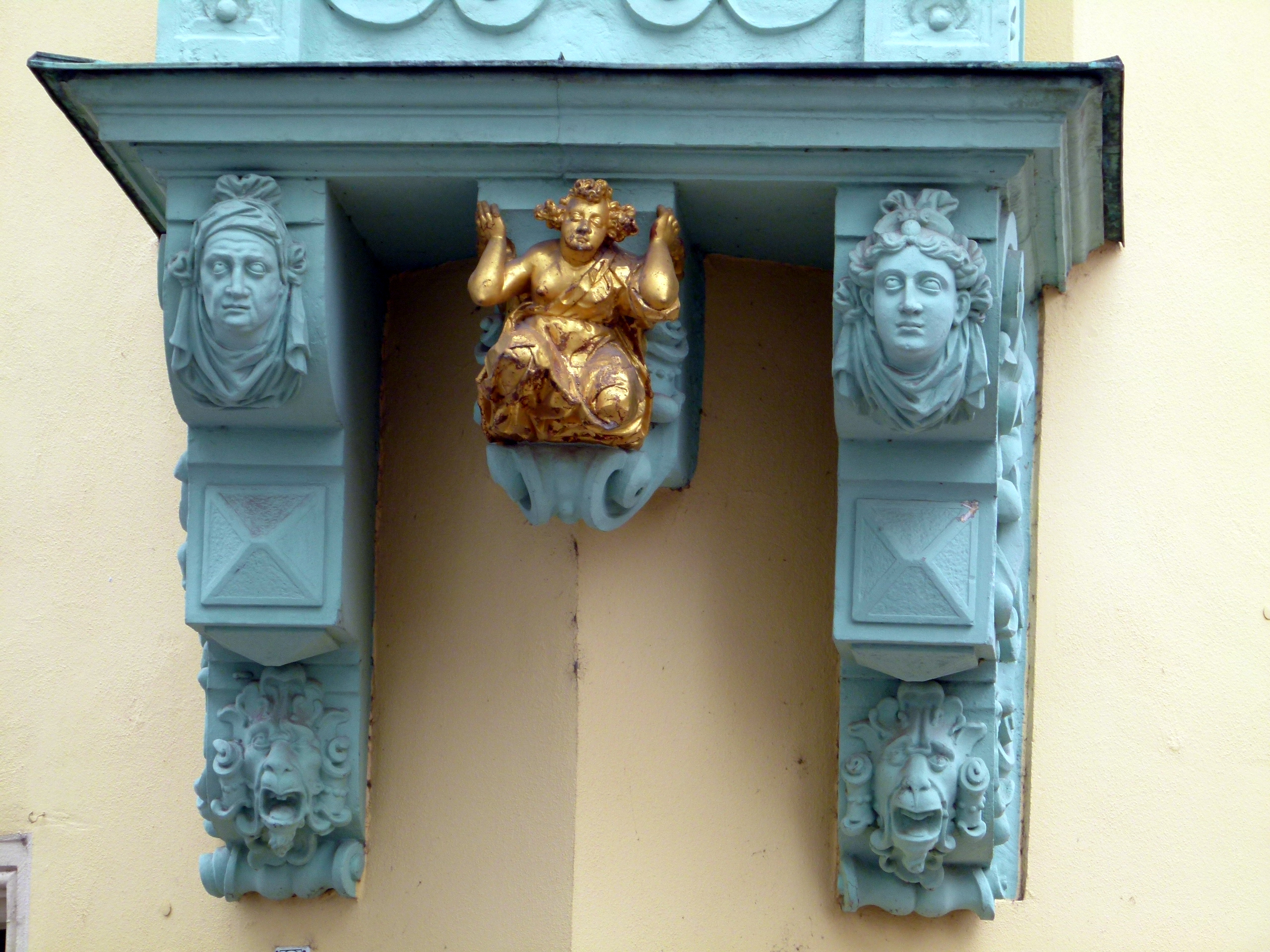 Erkerdetails, Denkmalgeschütztes Engelserkerhaus, Barbiergasse 10, Pirna, Sachsen